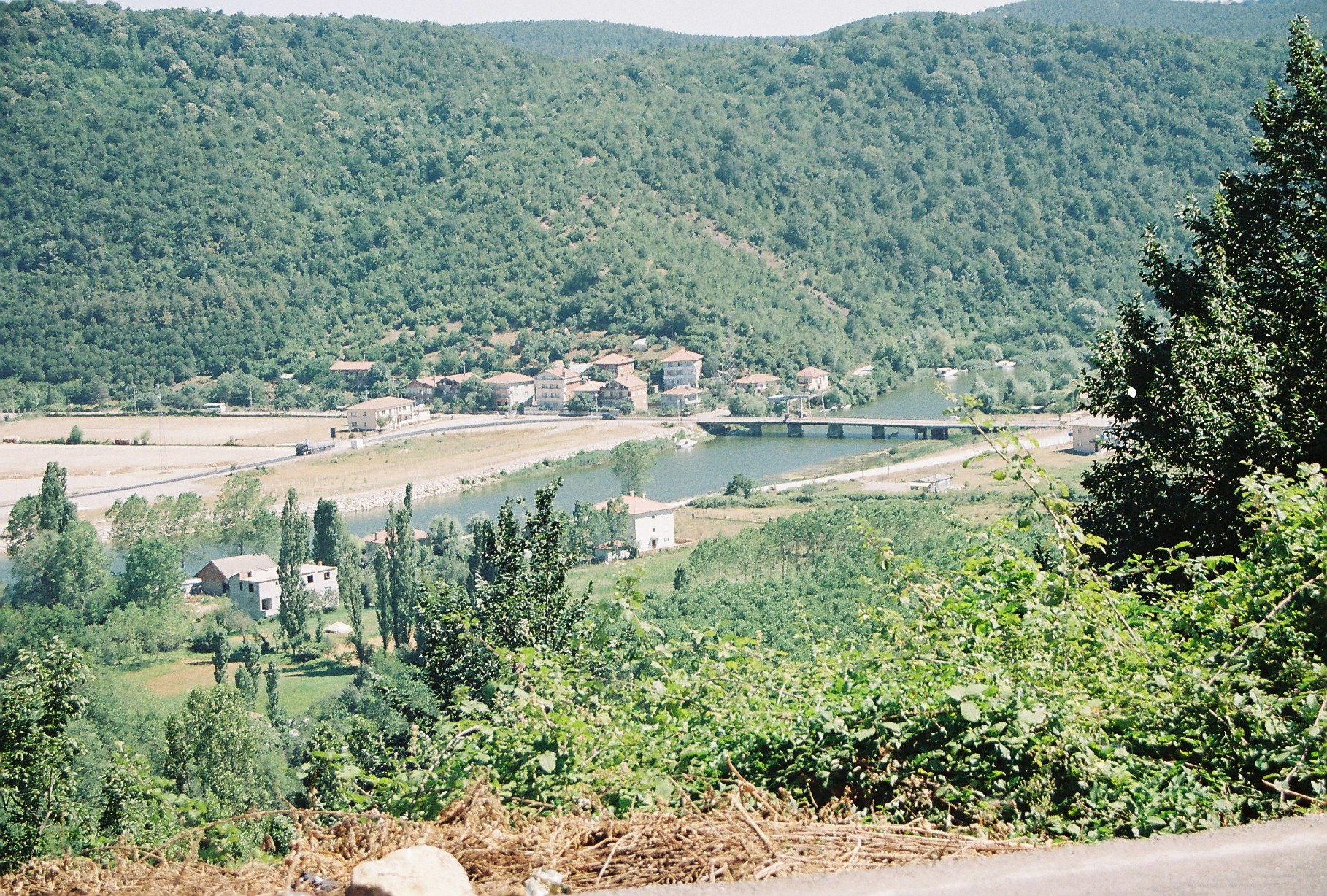 Bartın River, near Black Sea